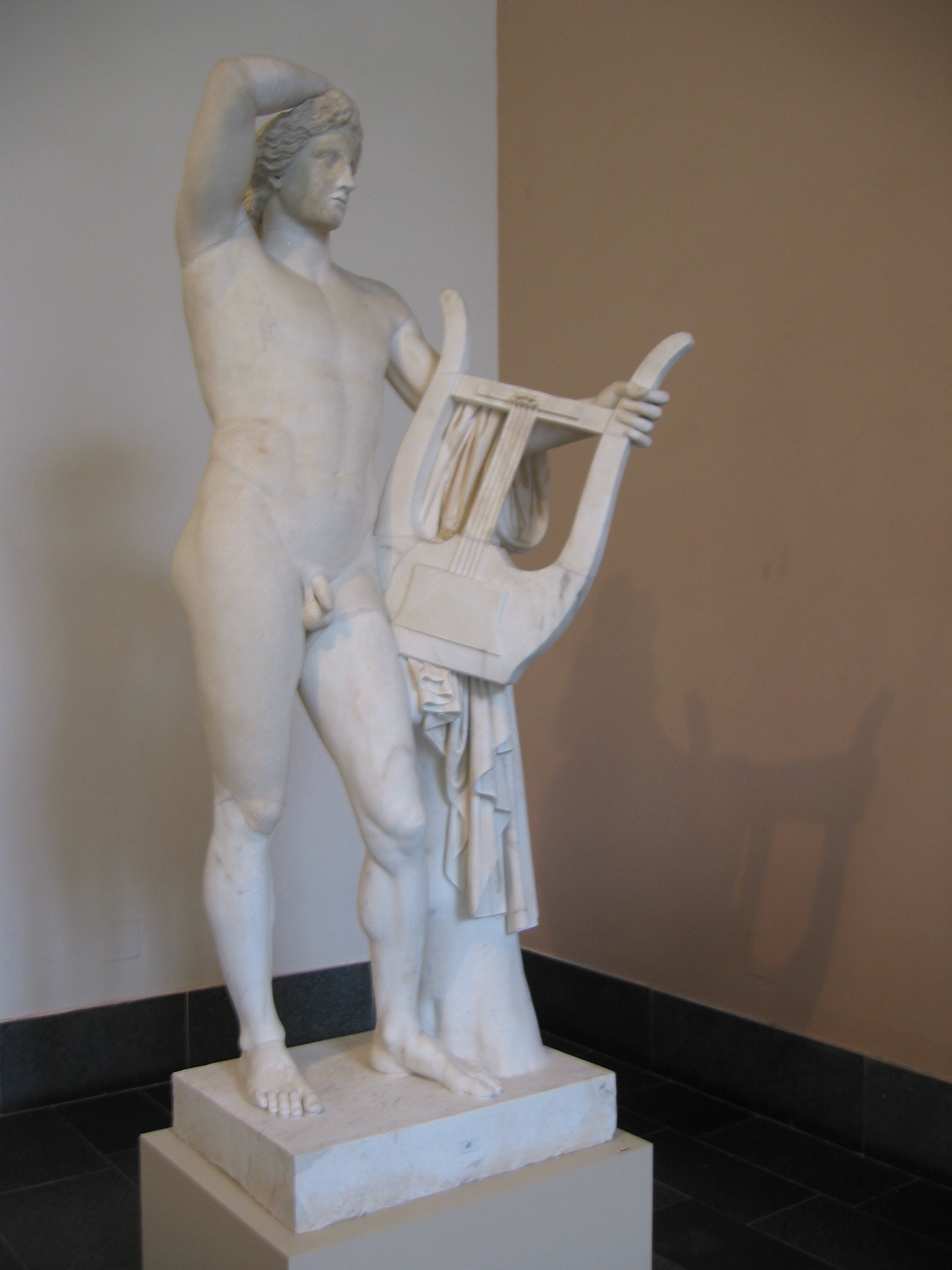 Apollo Kitharoidos, Marmorstatue, wohl im 2. Jahrhundert in Rom gefertigt, um 1766 von Bartolomeo Cavaceppi restauriert, danach durch Agenten von Friedrichs des Großen erworben, Höhe 213 cm, Sk 44